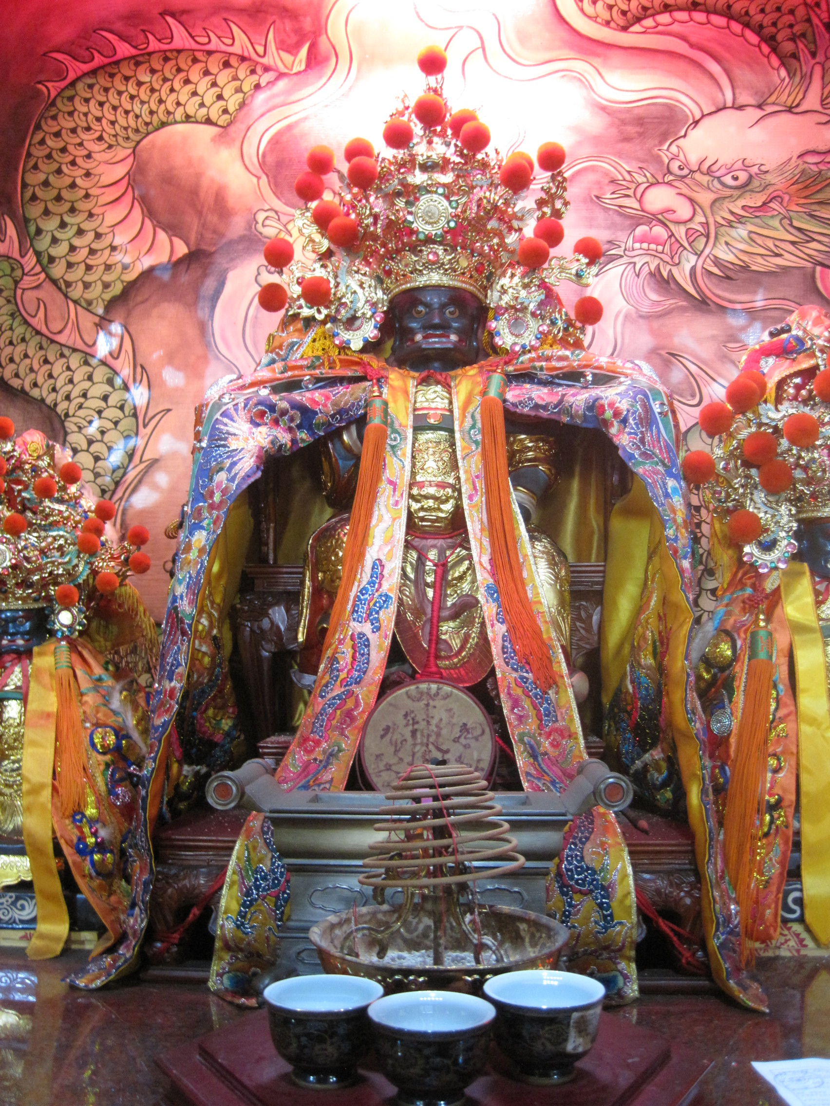 中文（台灣）: 新化武安宮大使爺神像